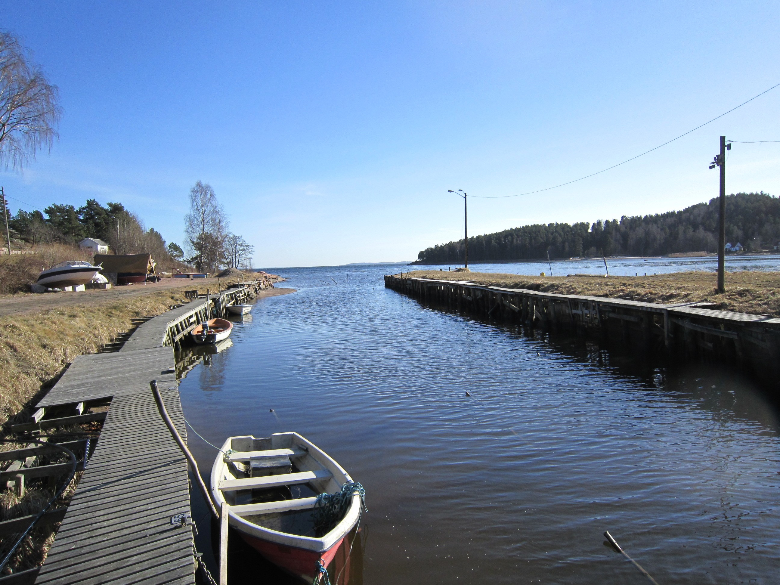 Berger i Svelvik kommune i Vestfold